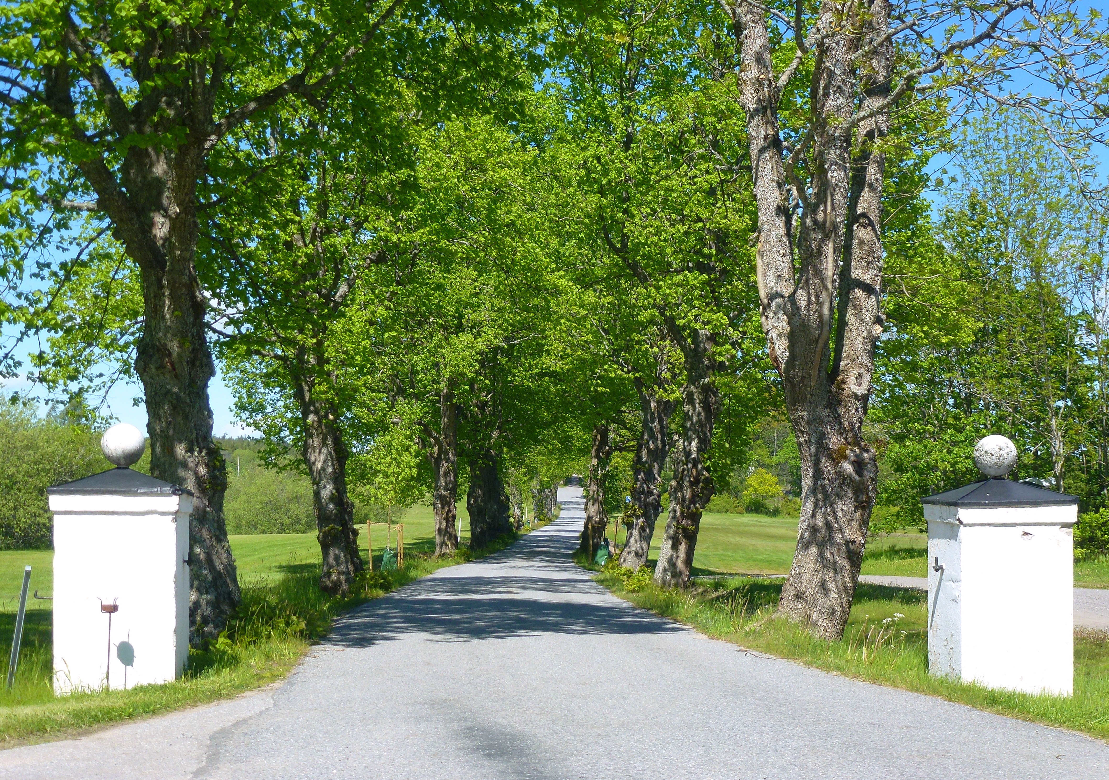 Körunda gård, allé